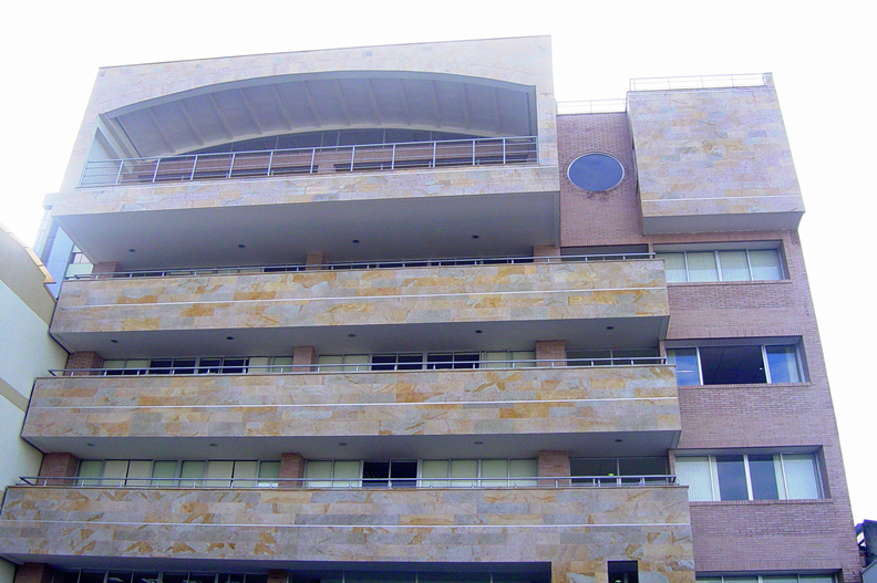 Edificio principal sede Areandina en Pereira